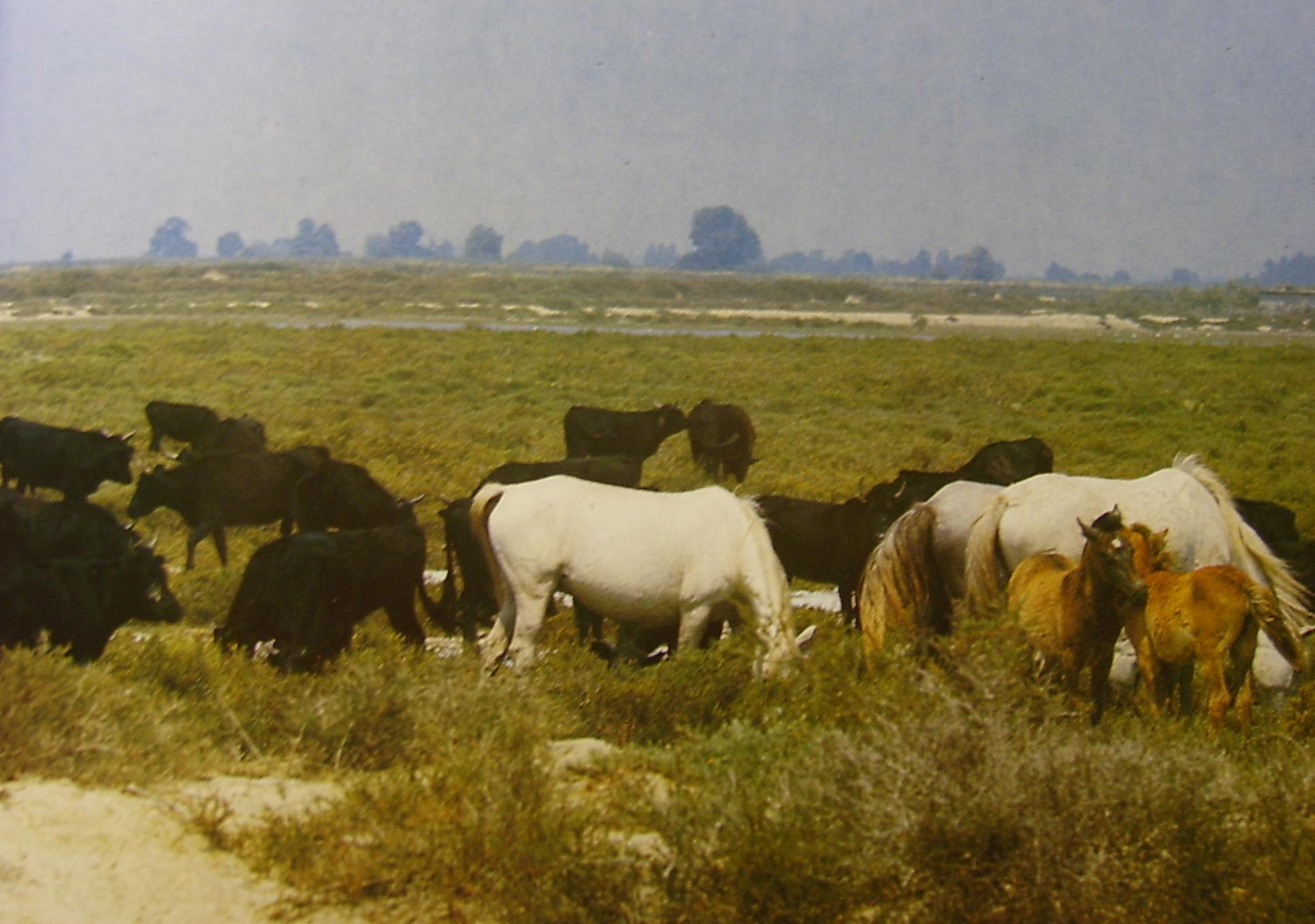 Wildpferde mit Fohlen und Stiere